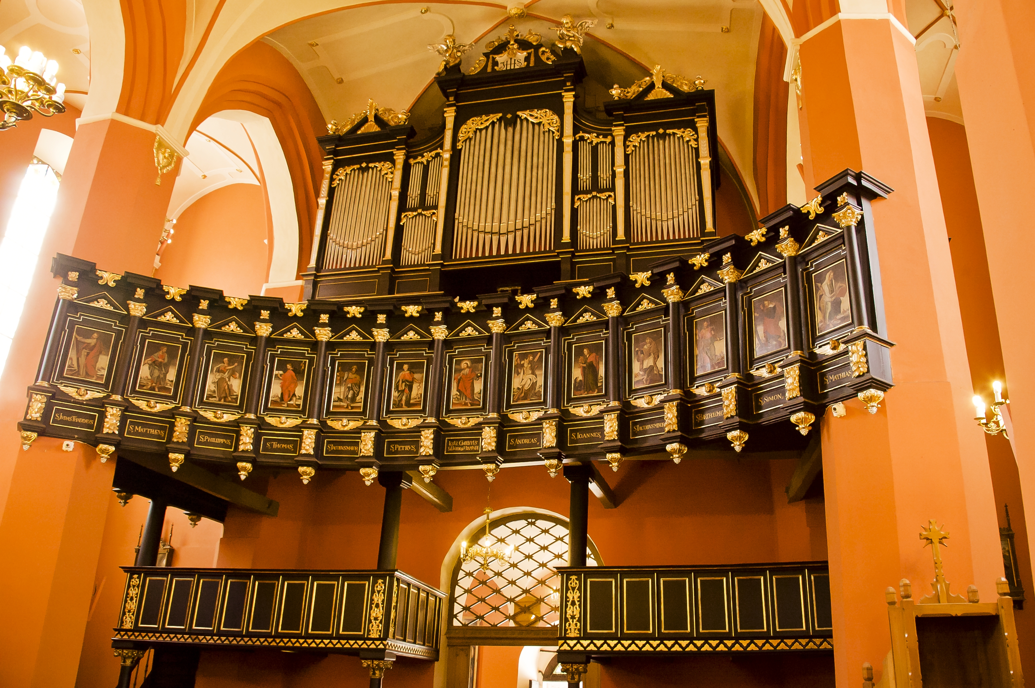 Zielona Góra - Konkatedra św. Jadwigi, ołtarz główny (zabytek nr I-4/11/52)